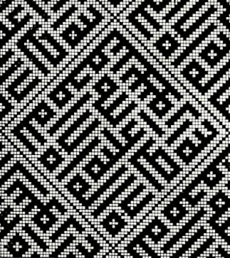 Qarabağlar türbəsinin fasad bəzəyi, təkrarlanan Allah sözləri